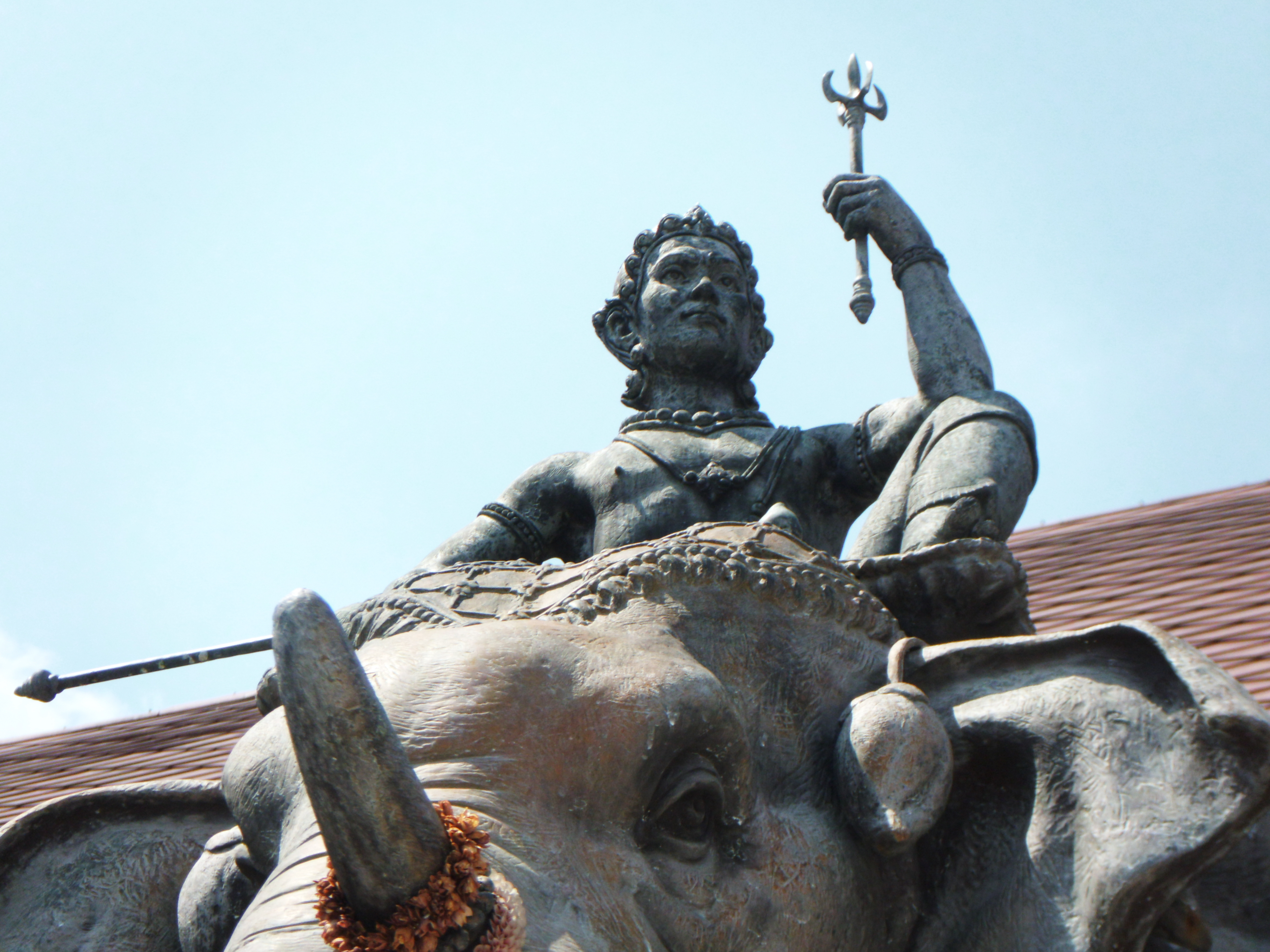 วัดเทวราชกุญชร